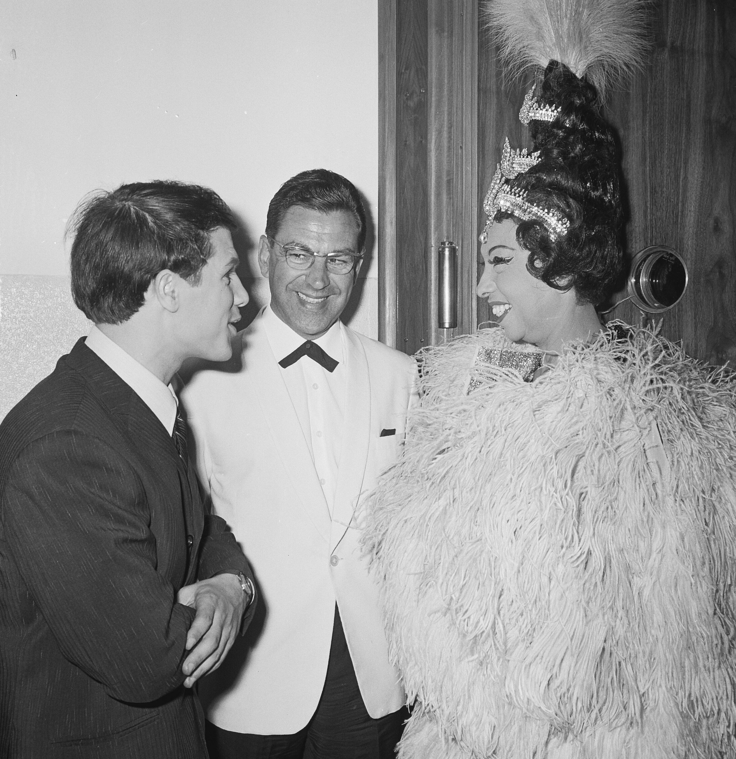 Collectie / Archief : Fotocollectie Anefo Reportage / Serie : [ onbekend ] Beschrijving : Grand Gala du Disque in Concertgebouw. Uitreiking Edisons. v.l.n.r. Adamo, Lou van Rees en Josephine Baker Datum : 4 oktober 1964 Locatie : Amsterdam Trefwoorden : managers, prijsuitreikingen, zangers Persoonsnaam : Adamo, Salvatore, Baker, Josephine, Rees, Lou van Fotograaf : Nijs, Jac. de / Anefo Auteursrechthebbende : Nationaal Archief Materiaalsoort : Negatief (zwart/wit) Nummer archiefinventaris : bekijk toegang 2.24.01.03 Bestanddeelnummer : 916-9670